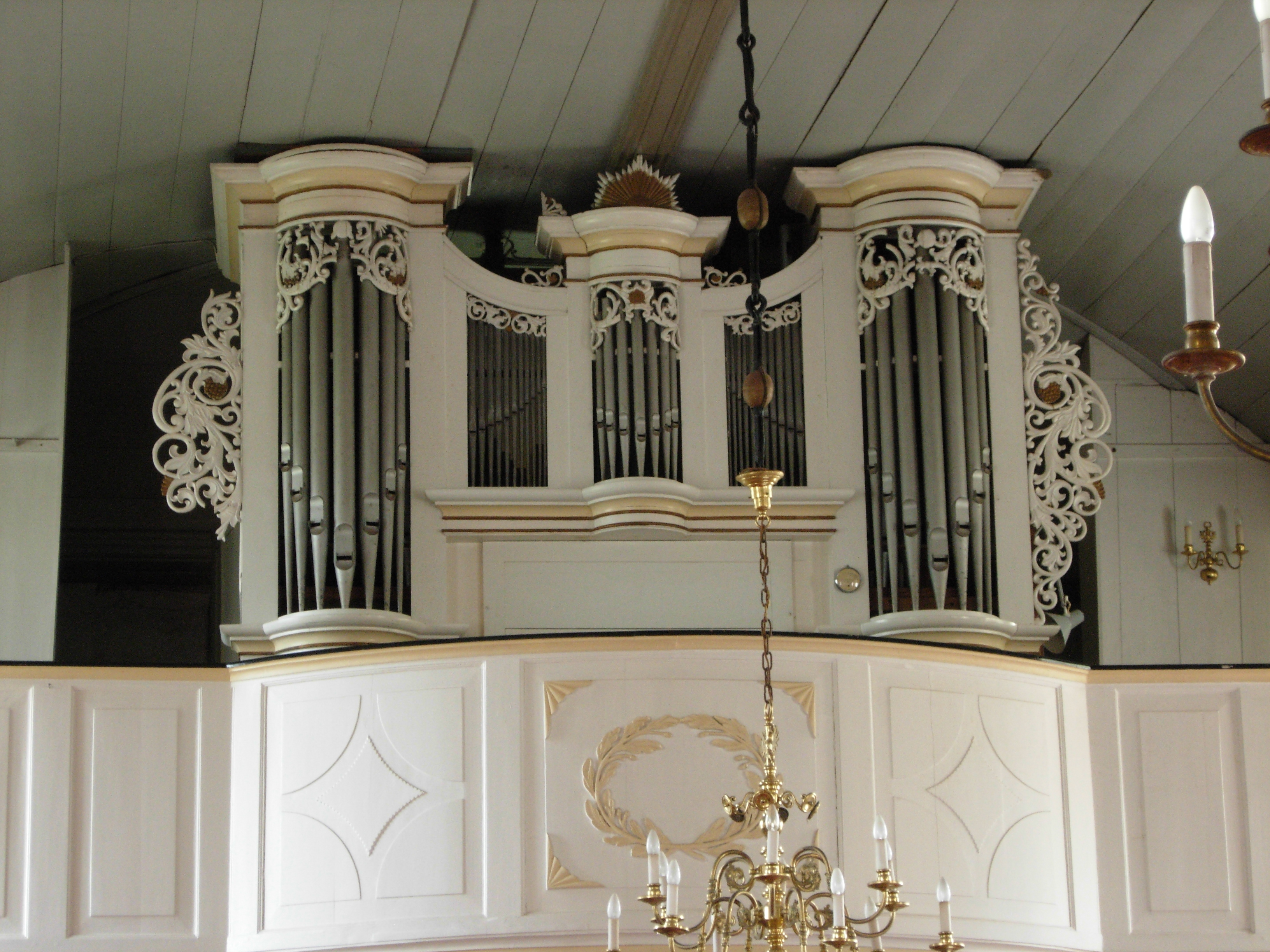 Orgel in Esklum, Westoverledingen